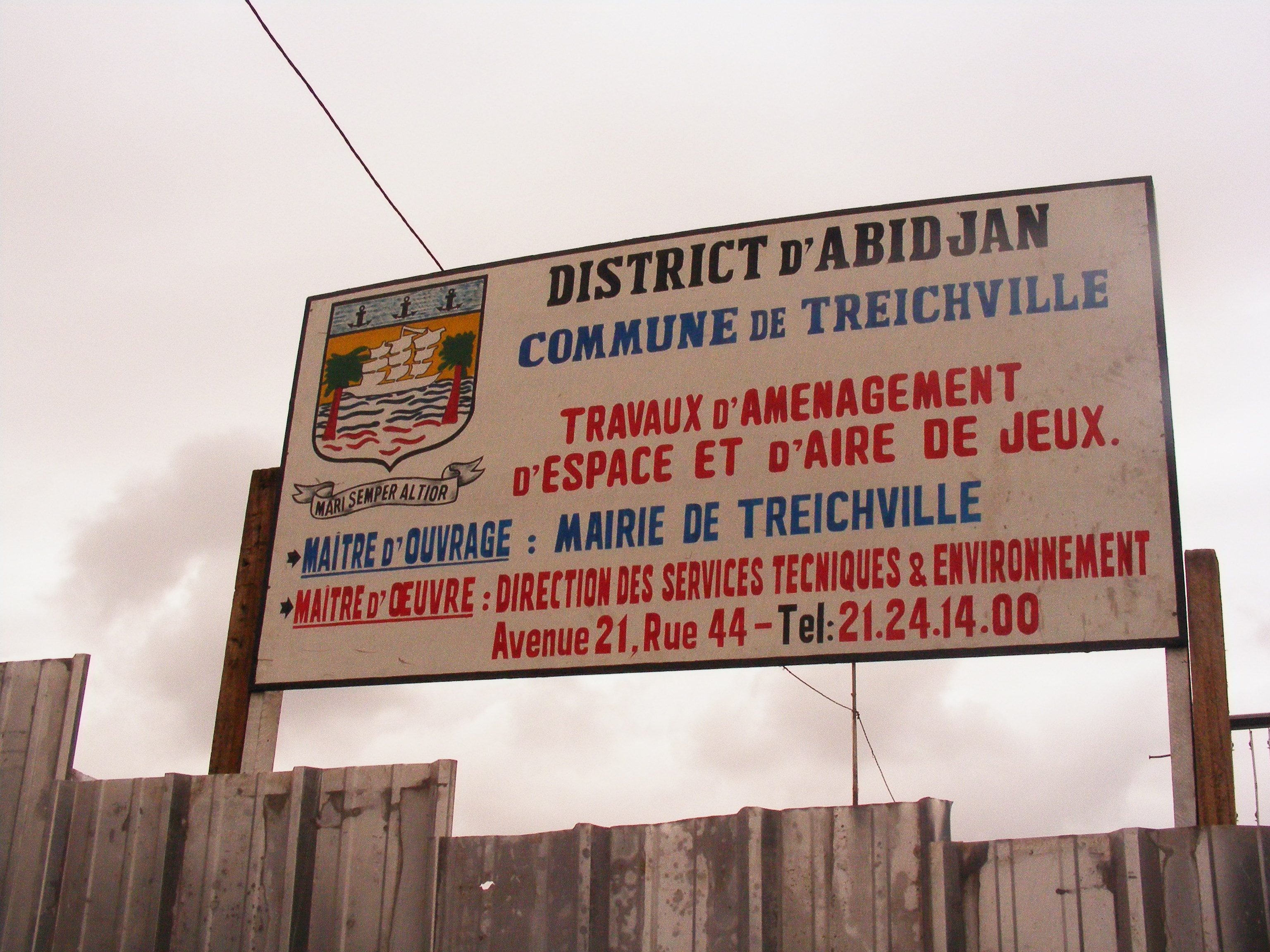 Travaux d'aménagement, Abidjan - Treichville